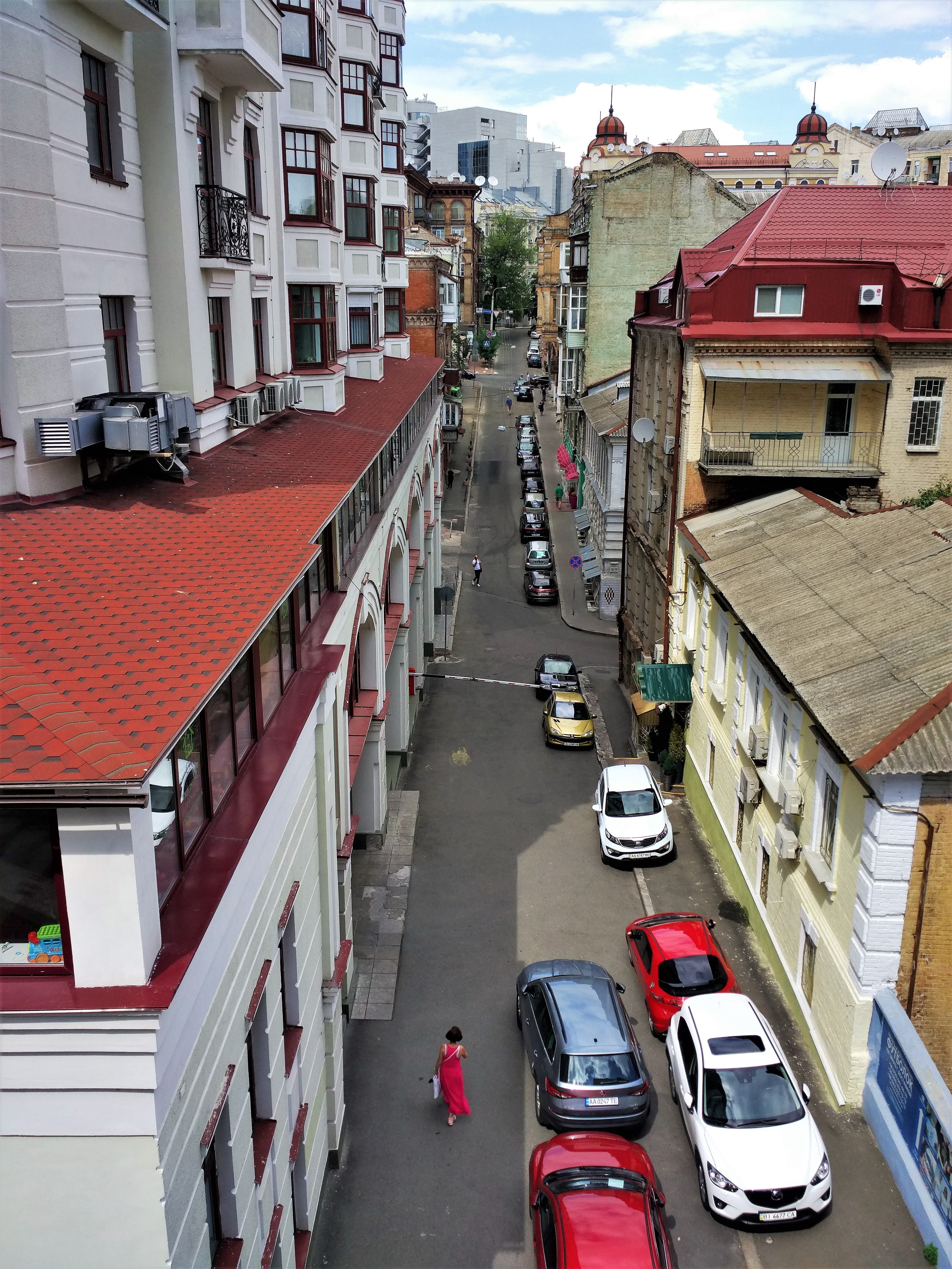 Михайлівський провулок, Київ